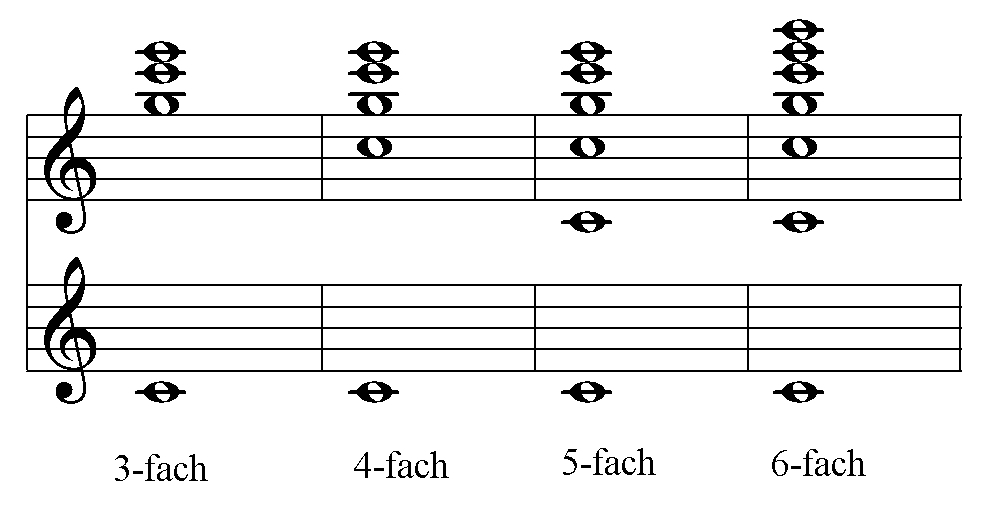 Verschiedene Ausfuehrungen eines Kornetts (Orgel).